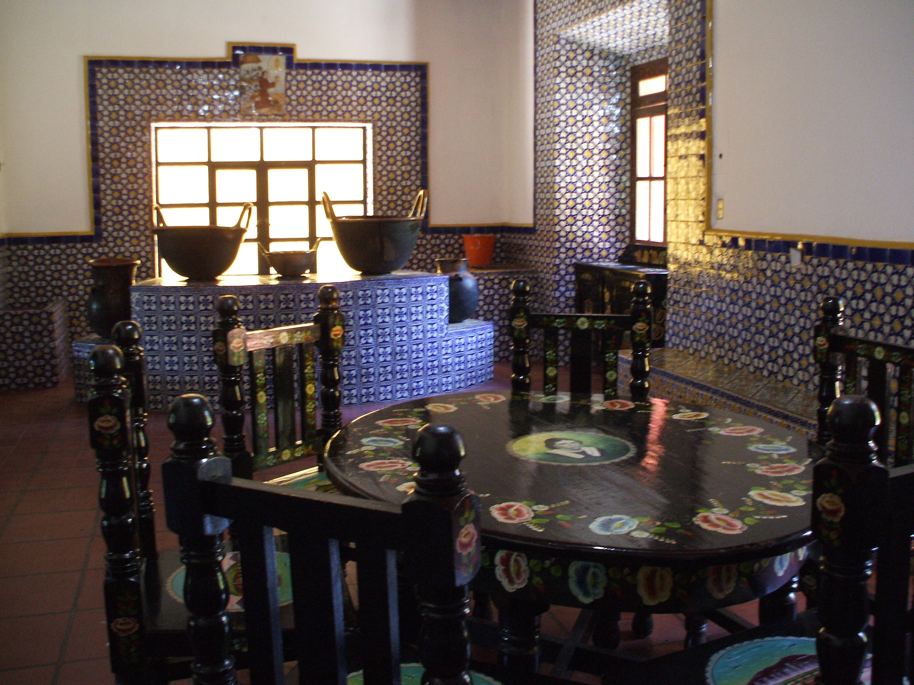 Comedor de la Ex Hacienda Chautla. Tanto la madera pintada como la talavera en las paredes hacen de éste espacio sea único y muy típico de la decoración Mexicana por muchos años.